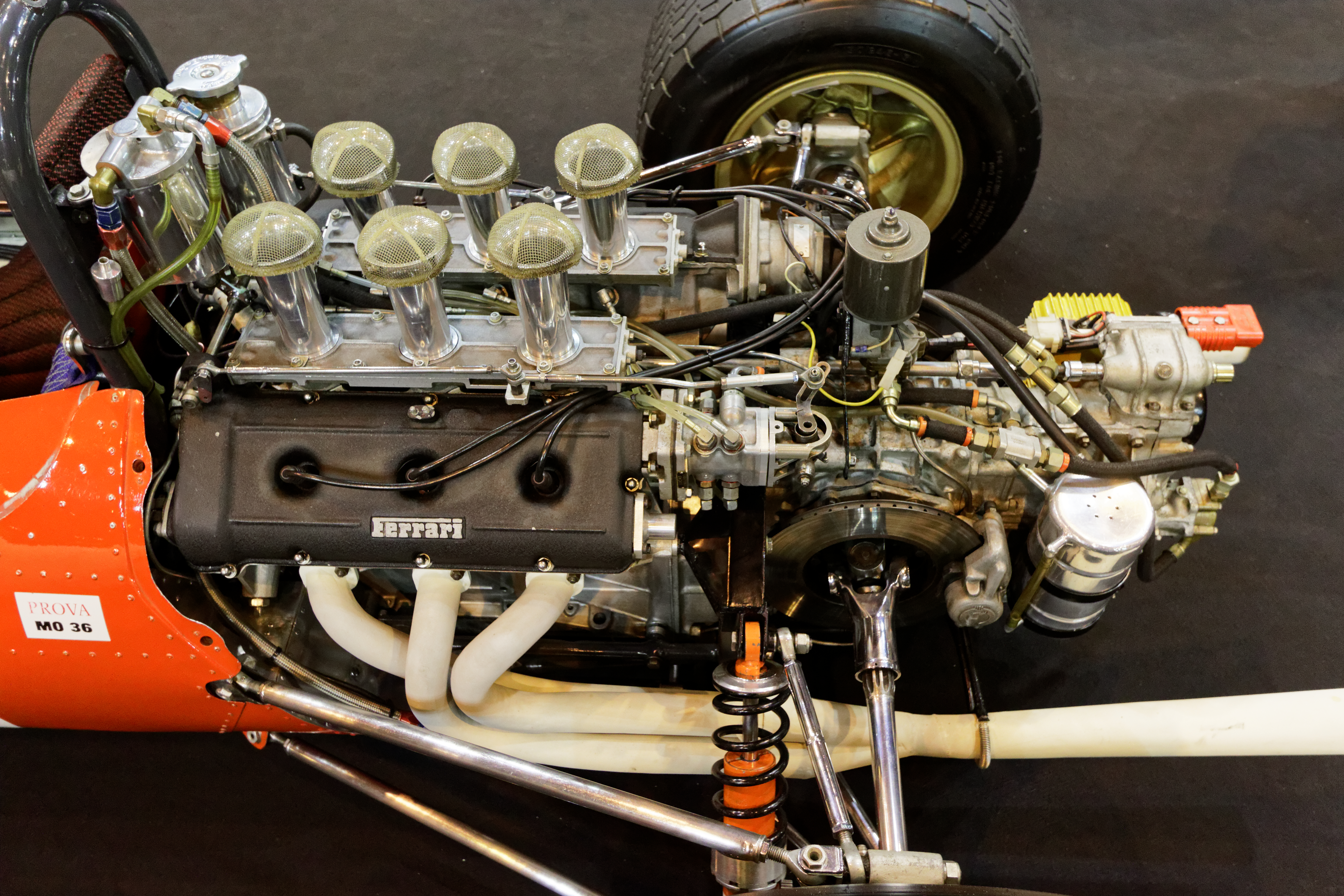 Une Ferrari Dino 166-246 Tasman F2 de 1968 exposée lors du salon Rétromobile 2016.